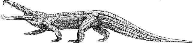 Bildbeschreibung: Leptosuchus gregorii, ein Vertreter der Phytosauria (Parasuchia), einer Schwestergruppe der Suchia (Krokodilverwandten), Fotograf/Zeichner: Petrified Forest National Park Petrified Forest, AZ Datum: n. b. andere Versionen: n. b.